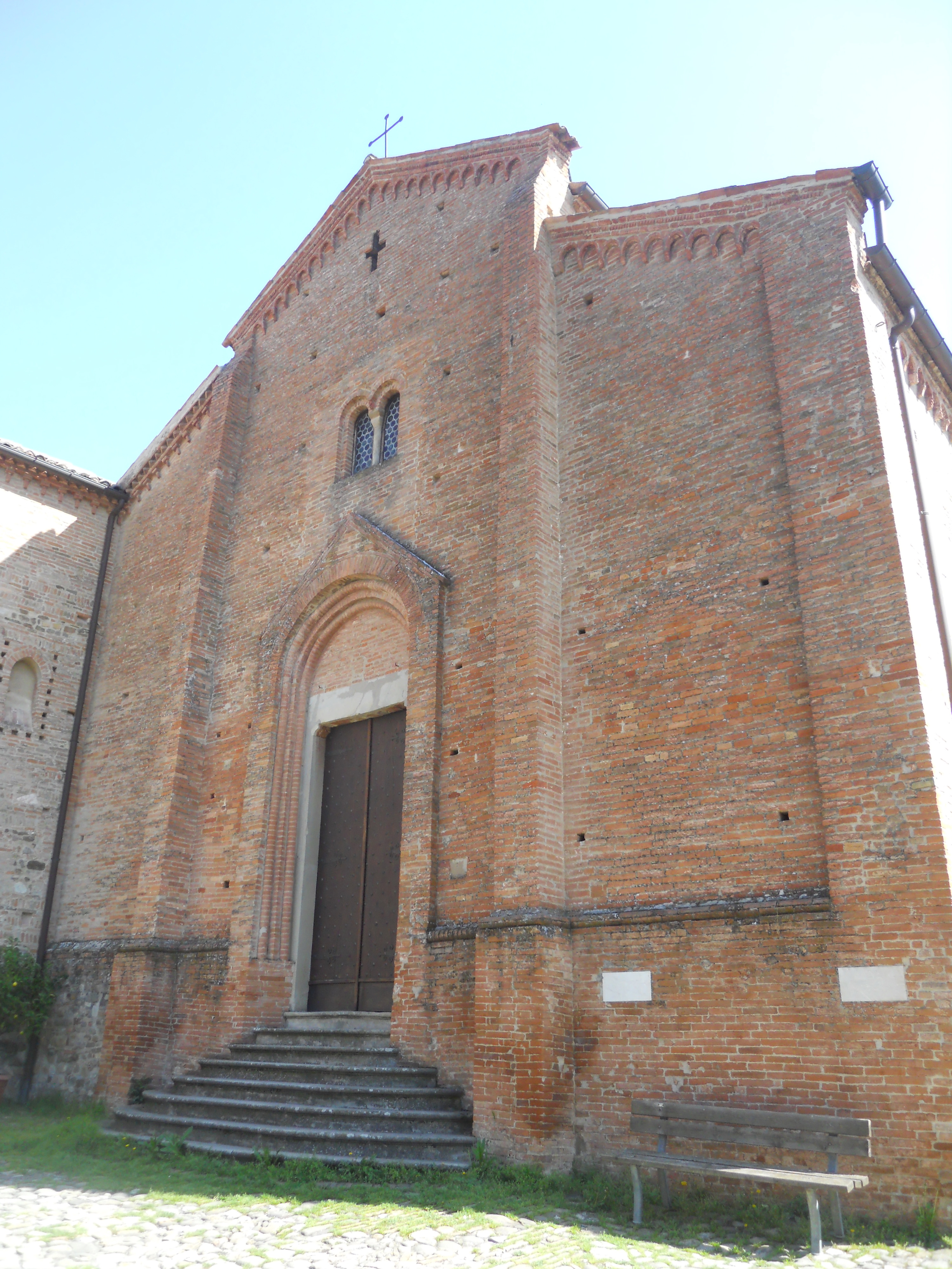 monteveglio abbazia